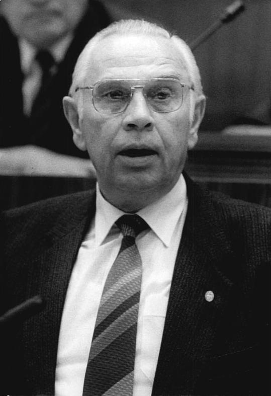 ADN-ZB/Mittelstädt 17.6.86- Berlin: Volkskammertagung Auf der 2. Tagung der Volkskammer sprach in der Diskussion als erster Redner Horst Dohlus, Mitglied des Politbüros und Sekretär des ZK der SED.